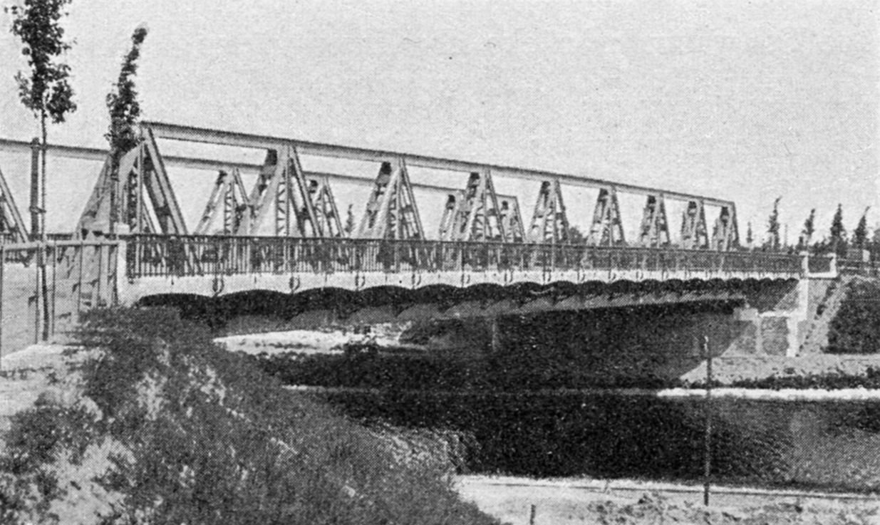 Oppenbrücke über den Teltowkanal in Berlin